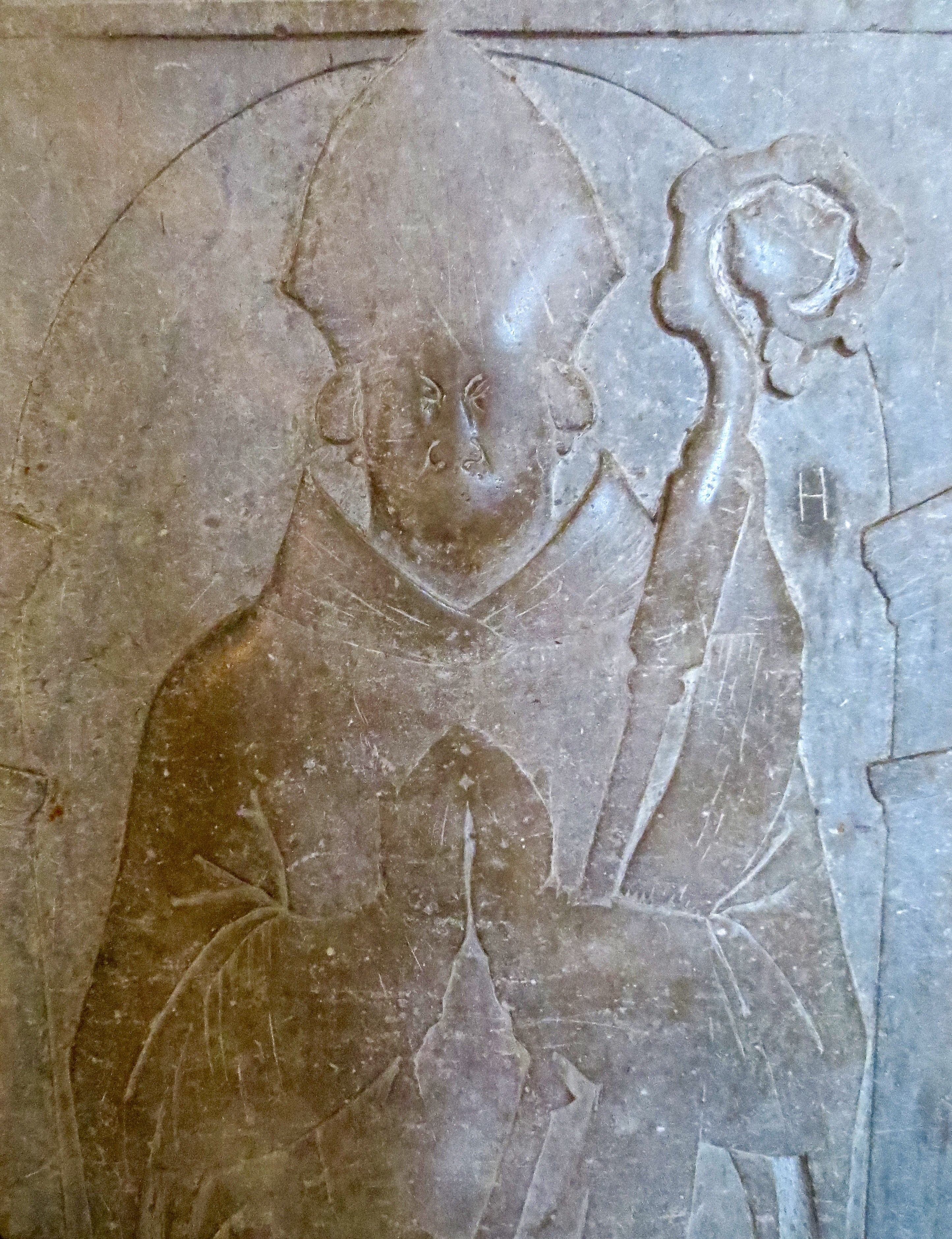 Gottschalk Ahlefeldt (1475-1541), biskop i Slesvig, Slesvig Domkirke, Tyskland